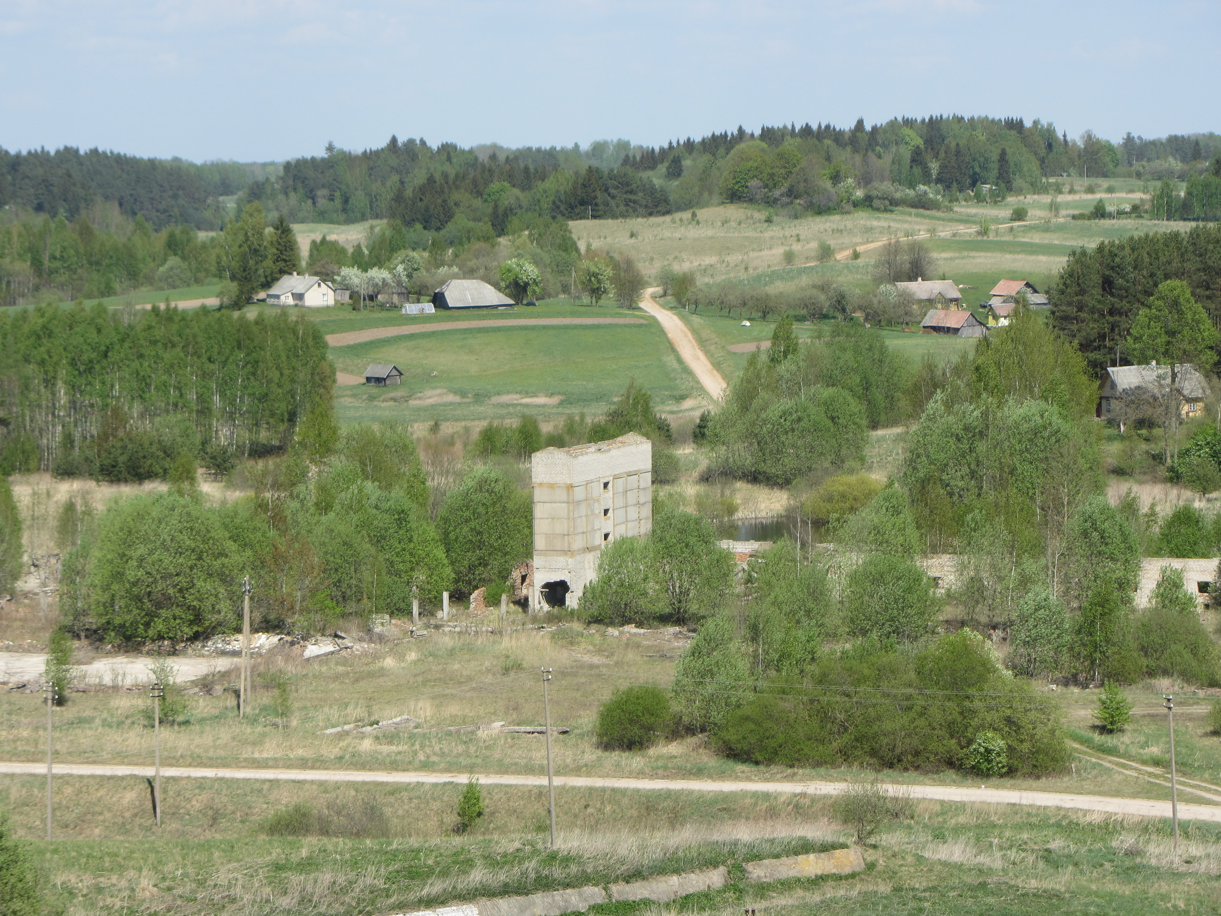 Bijutiškis 33254, Lithuania